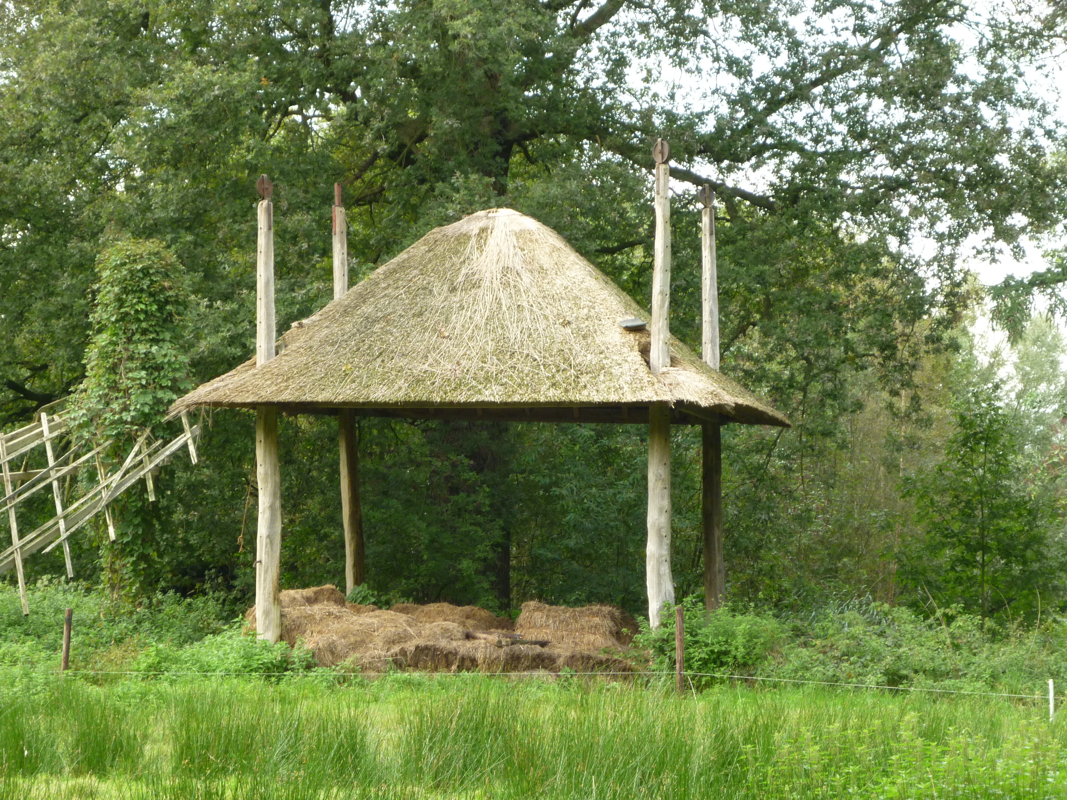 Boerderij Den Aller - Diermenseweg 3, Putten, Gelderland Hooiberg - 4 roeden